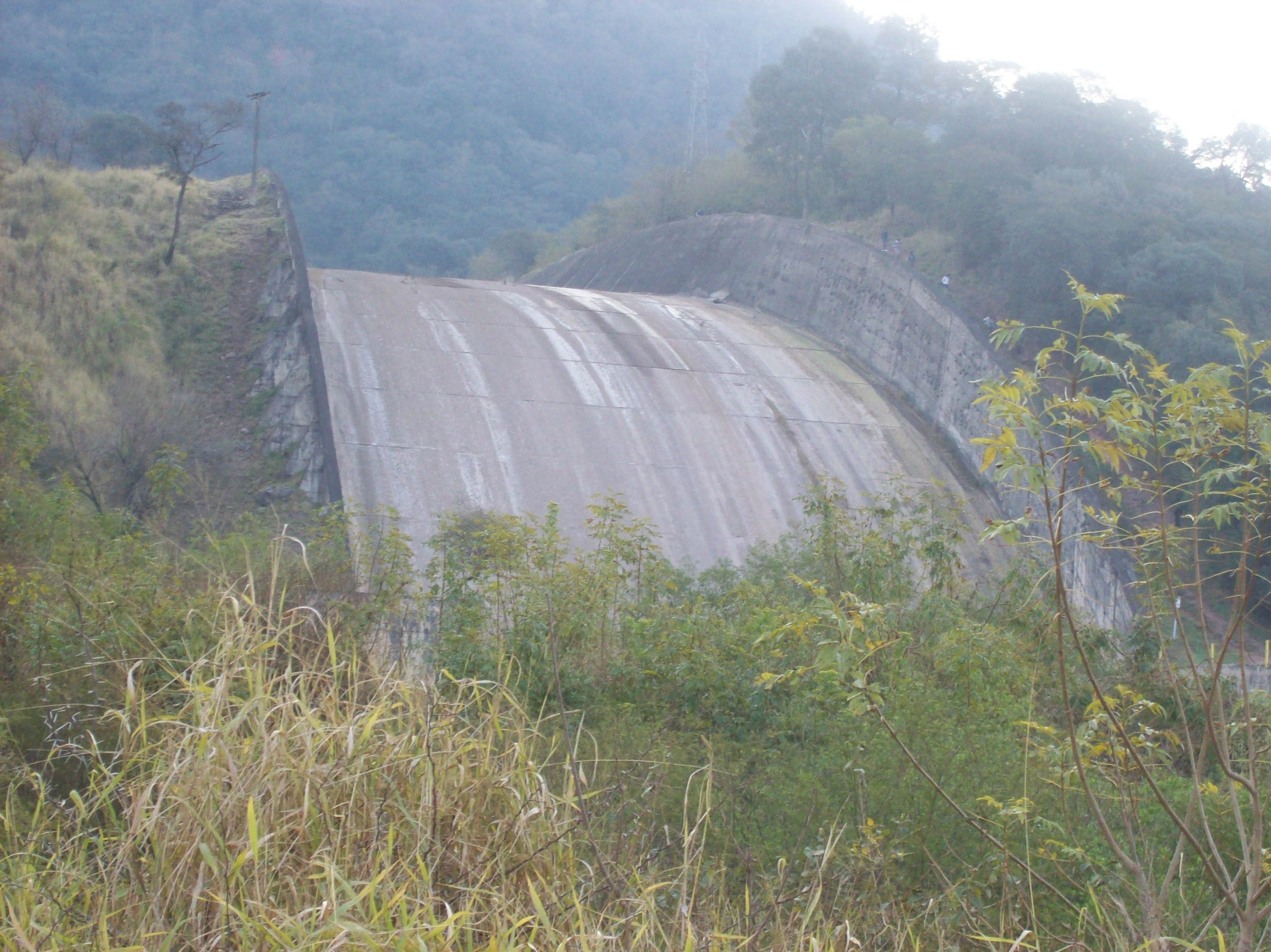 Vertiente del Dique Celestino Gelsi, en El Cadillal, provincia de Tucumán, Argentina.